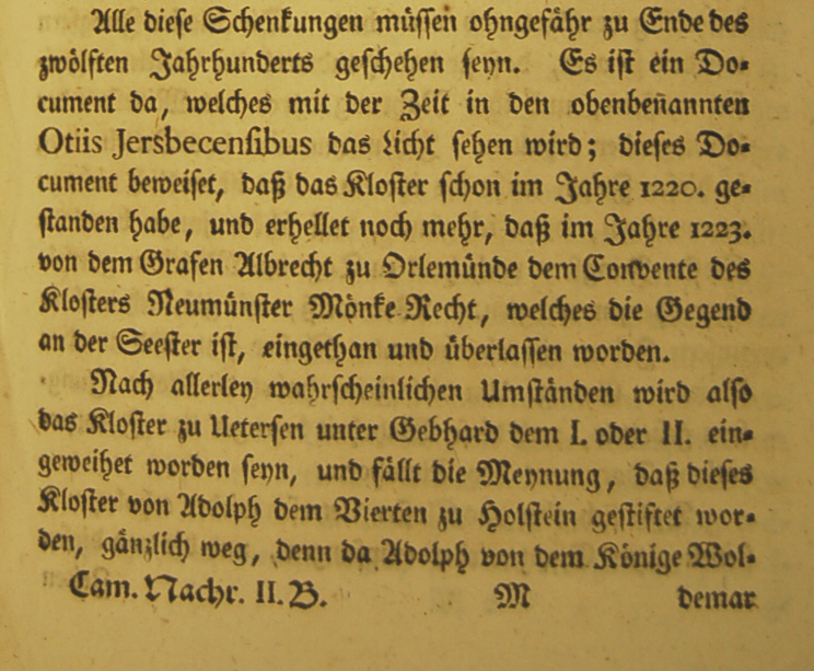 Ausschnitt einer Buchseite der Historisch-Politischen Nachrichten von Johann Friedrich Camerer aus dem Jahre 1762. Aus dem hervorgeht, dass es schon ein Kloster in Uetersen vermutlich schon vor 1220 gab. Auf Grund des Alters des Buches (1762) sind alle Rechte abgelaufen.